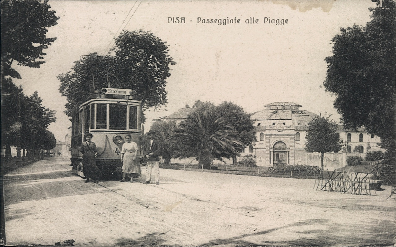 Trama davanti al Politeama